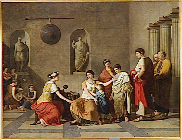 Cornelia, madre dei Gracchititle QS:P1476,it:"Cornelia, madre dei Gracchi" label QS:Lit,"Cornelia, madre dei Gracchi"